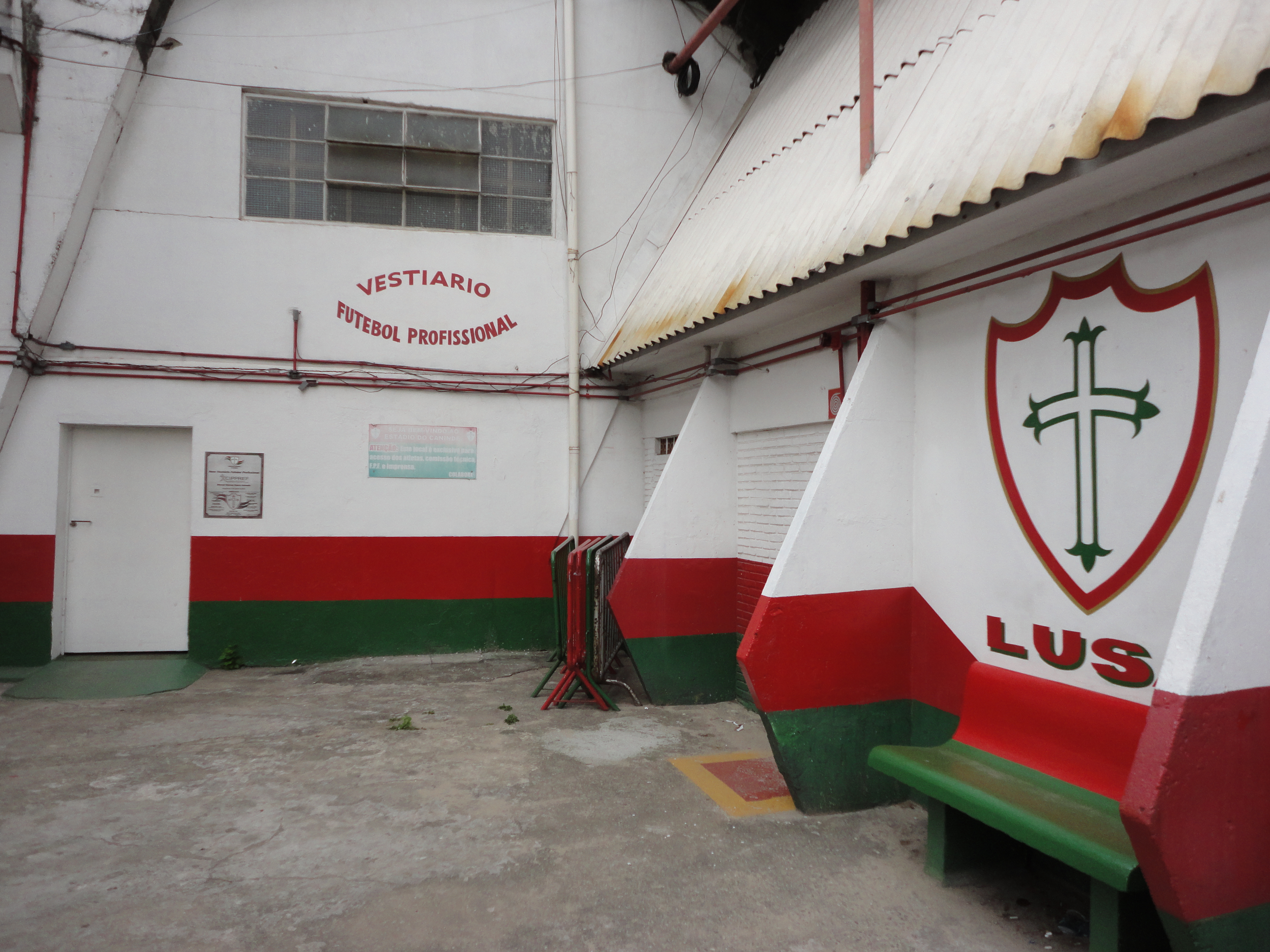 Entrada do vestiário da Portuguesa no Canindé, em São Paulo, Brasil